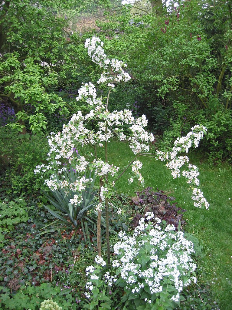 Zelfgemaakte foto van sierapplel Red Sentinel in bloei; eind april